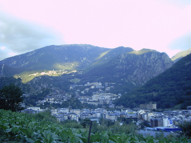 Andorra la Vella vlastní foto